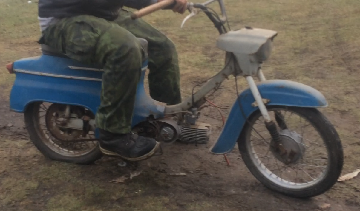 Pionýr